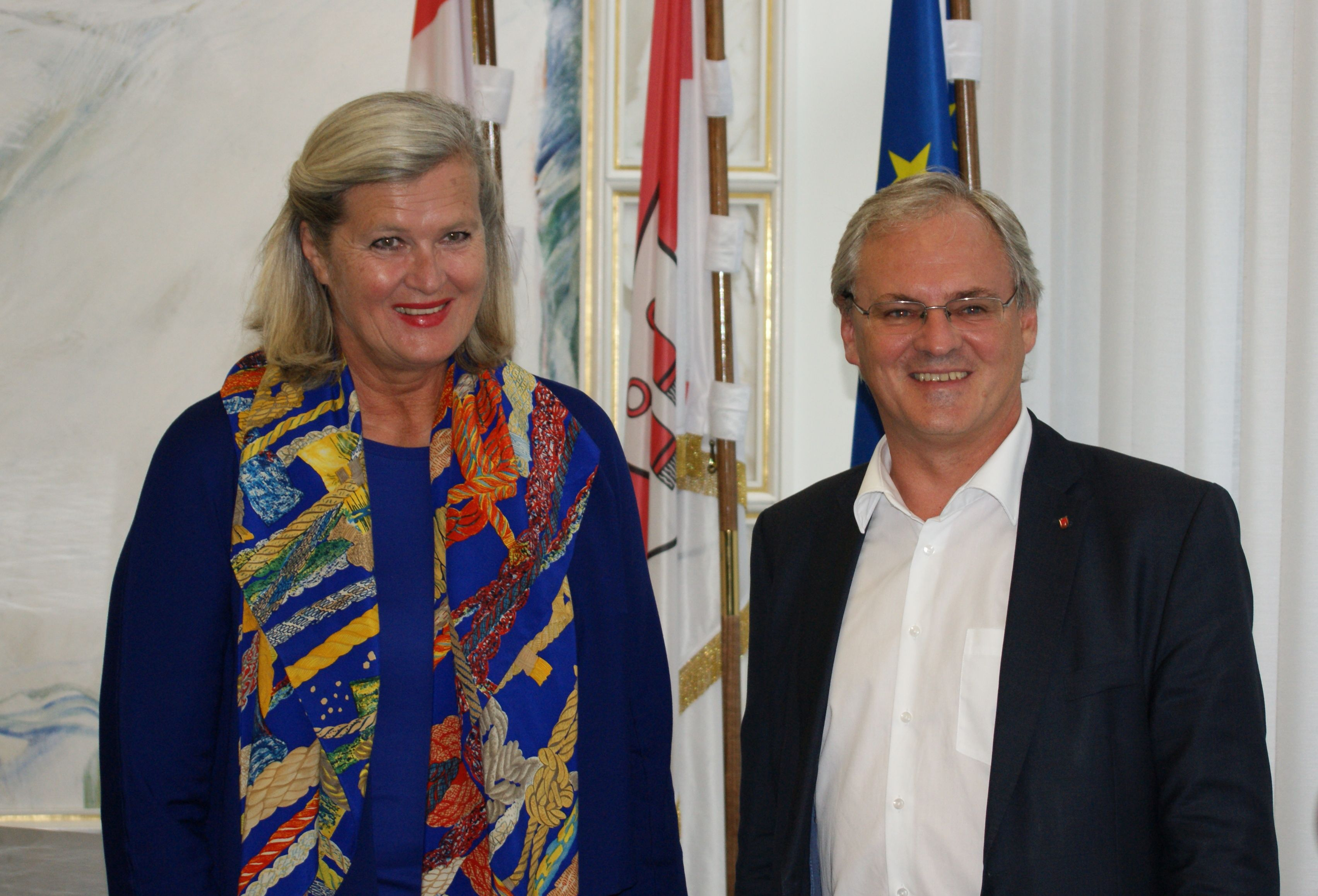 Vortrag von Ursula Plassnik: "Mittendrin statt nur dabei - Österreich und der EU-Vorsitz" im Vorarlberger Landhaus in Bregenz, Vorarlberg, Österreich, am 02.10.2018. Im Bild Ursula Plassnik (links) und Harald Sonderegger (rechts).